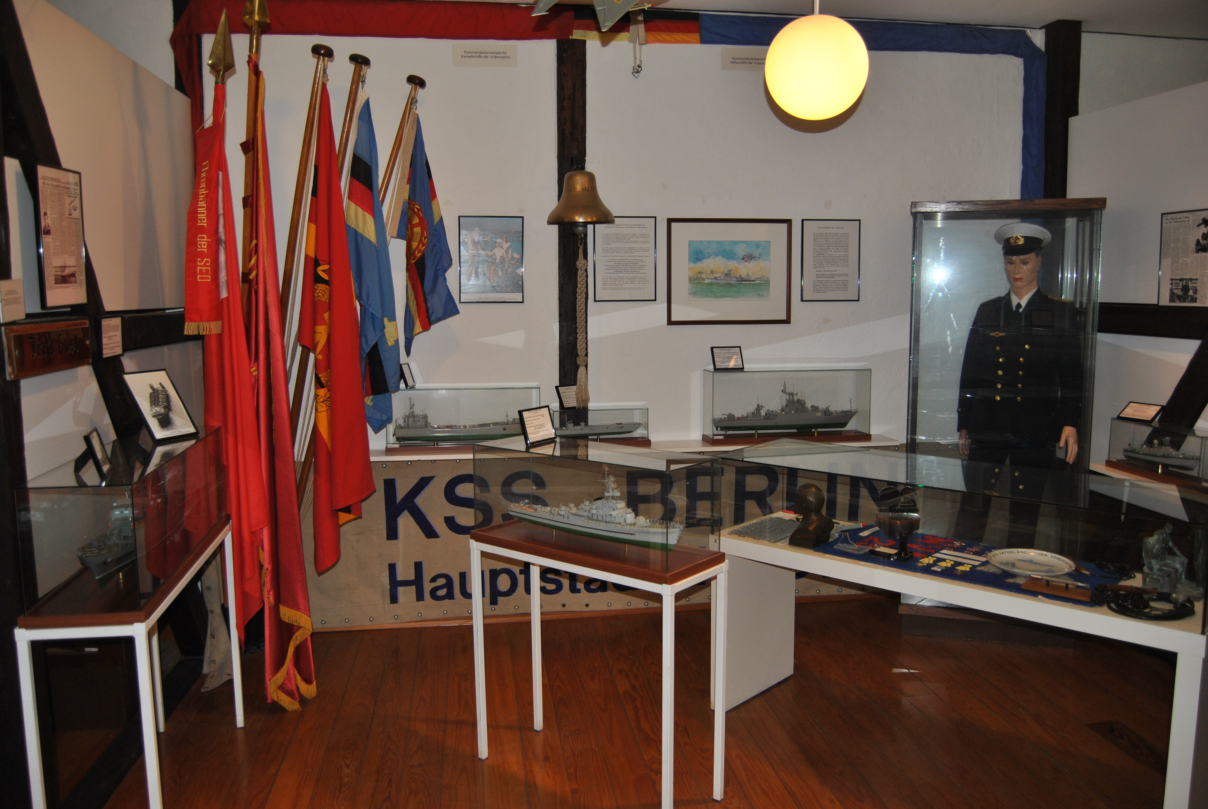 Ausstellungsraum zur Volksmarine, Wehrgeschichtliches Ausbildungszentrums der Marineschule Mürwik.